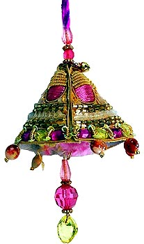 hi:राजस्थान में प्रयुक्त की जाने वाली चूड़ाराखी